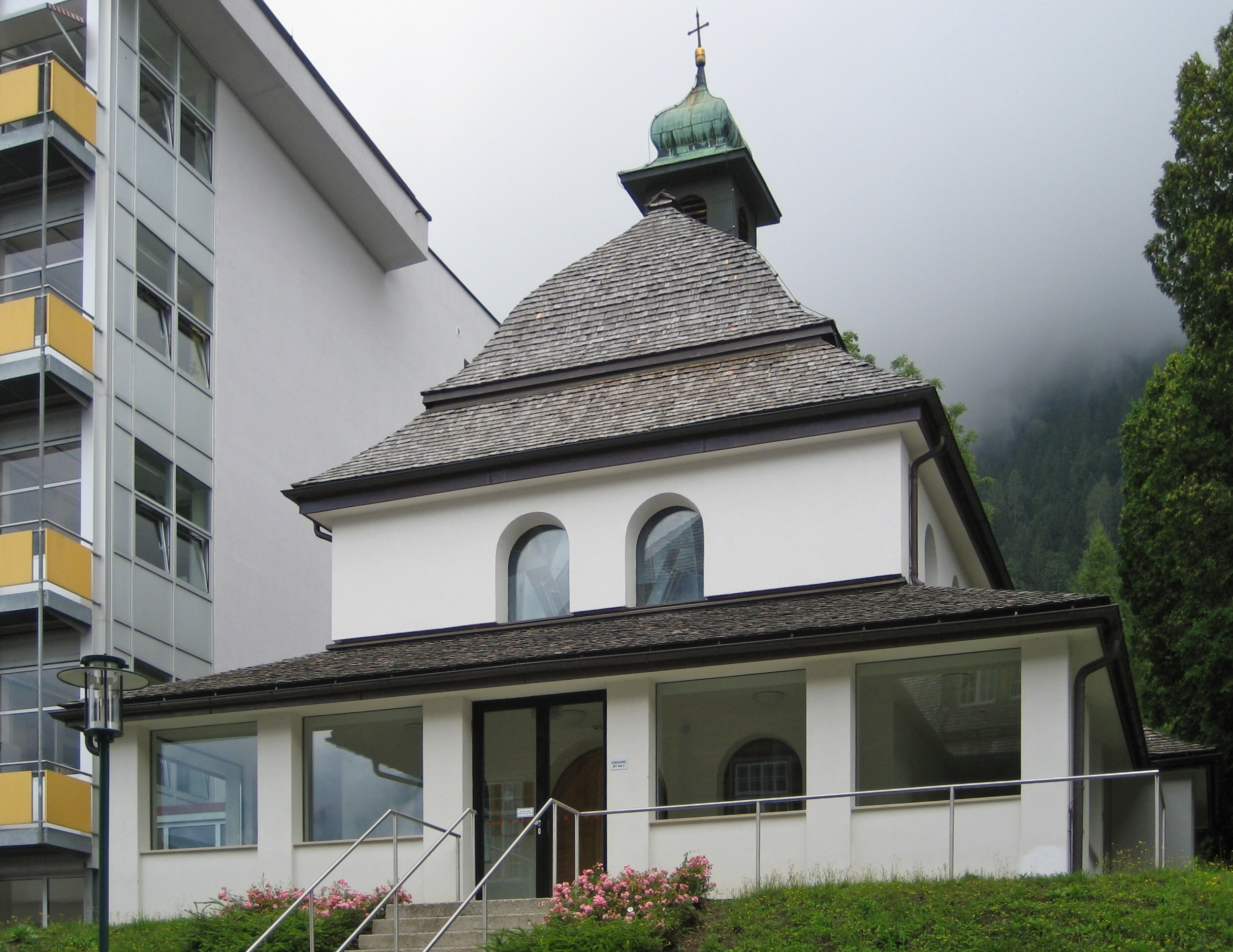 Kapelle der Lungenheilstätte hl. Kreuz in Sankt Veit im Pongau